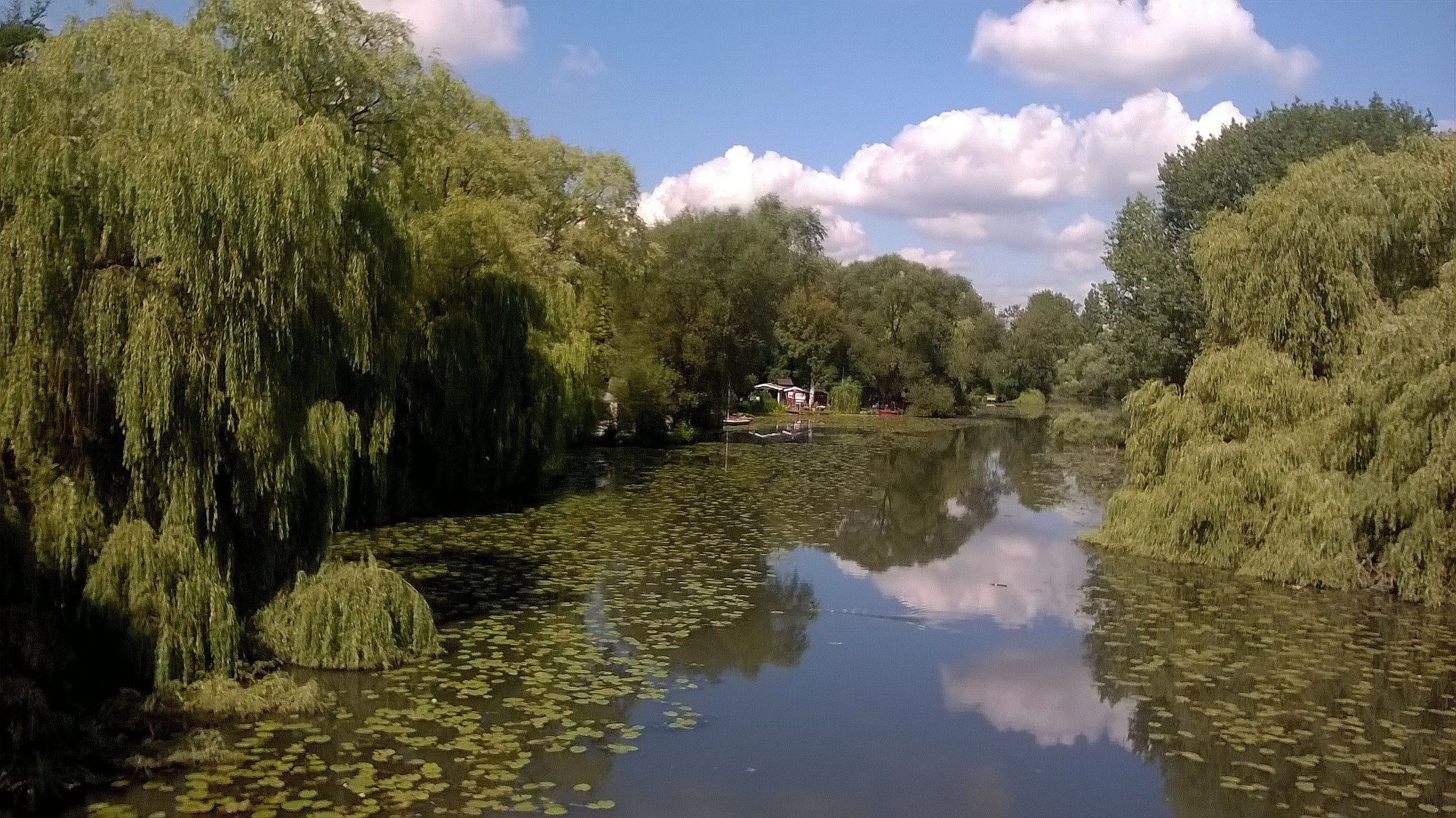 Wilhelmsburger Dove Elbe in Hamburg-Wilhelmsburg